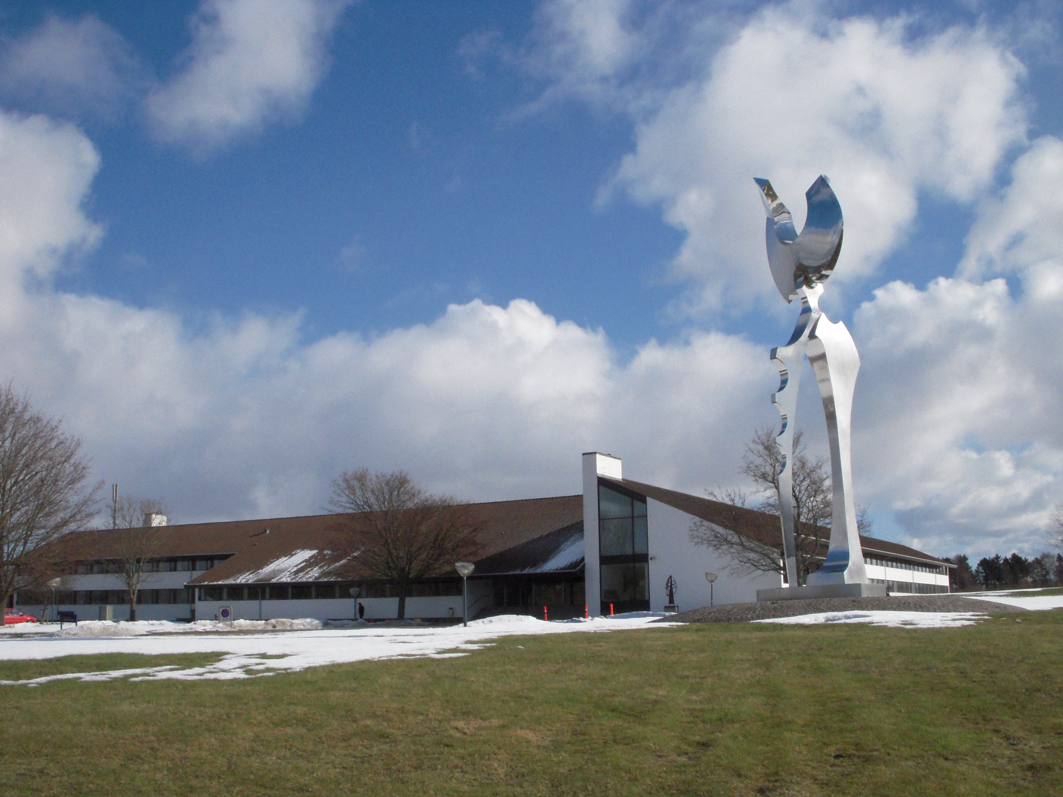 Dansk Metal's kursusejendom, "Metalskolen", i Jørlunde på Sjælland. Marts 2010.